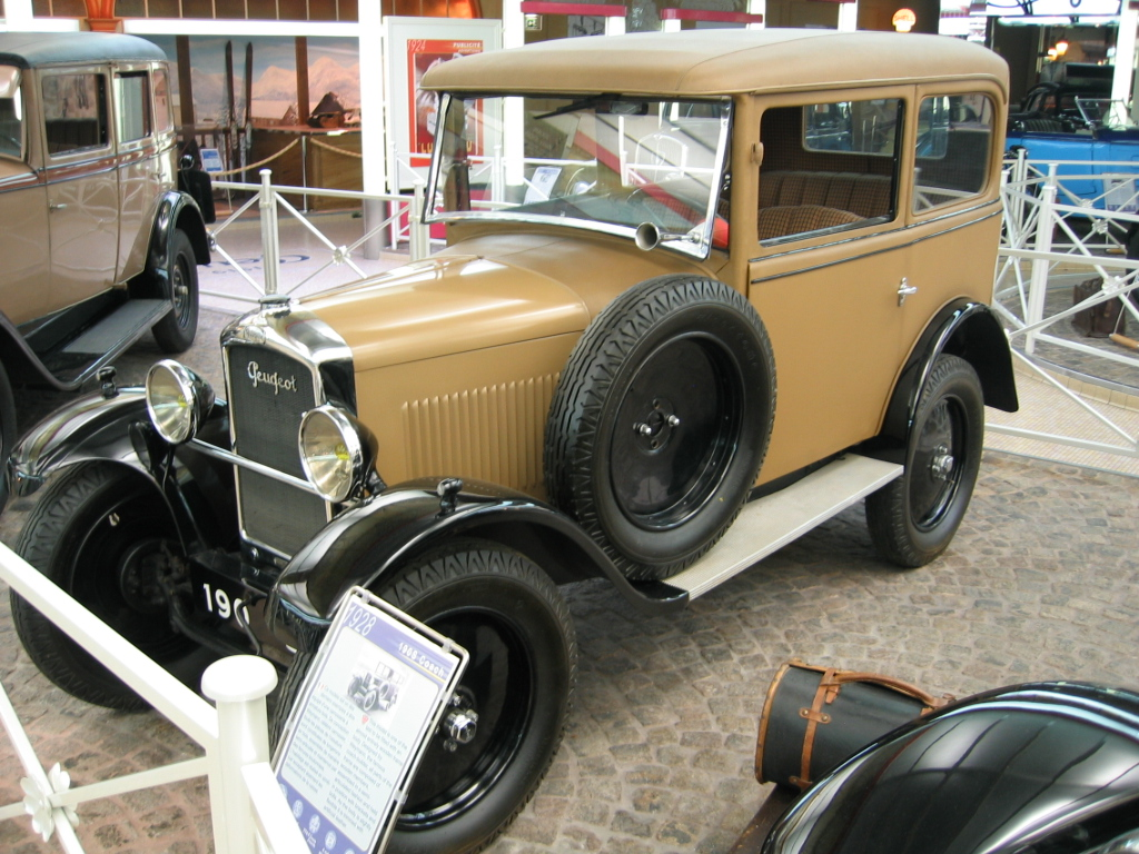 Peugeot Type 190 - Musée Peugeot Sochaux